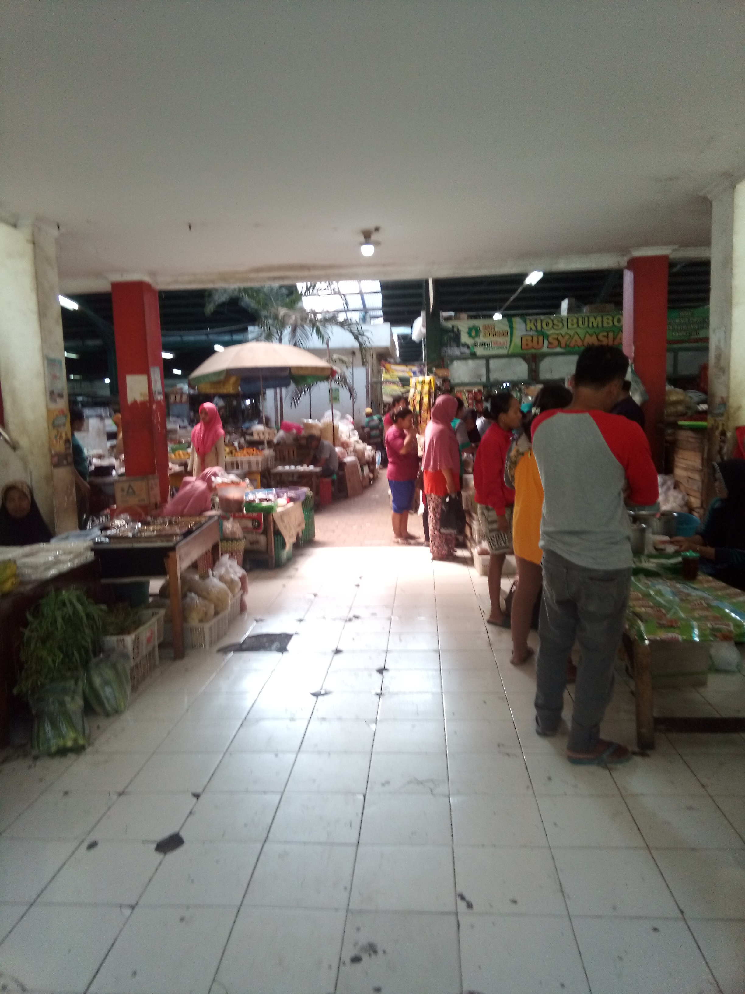 Jawa: Pasar